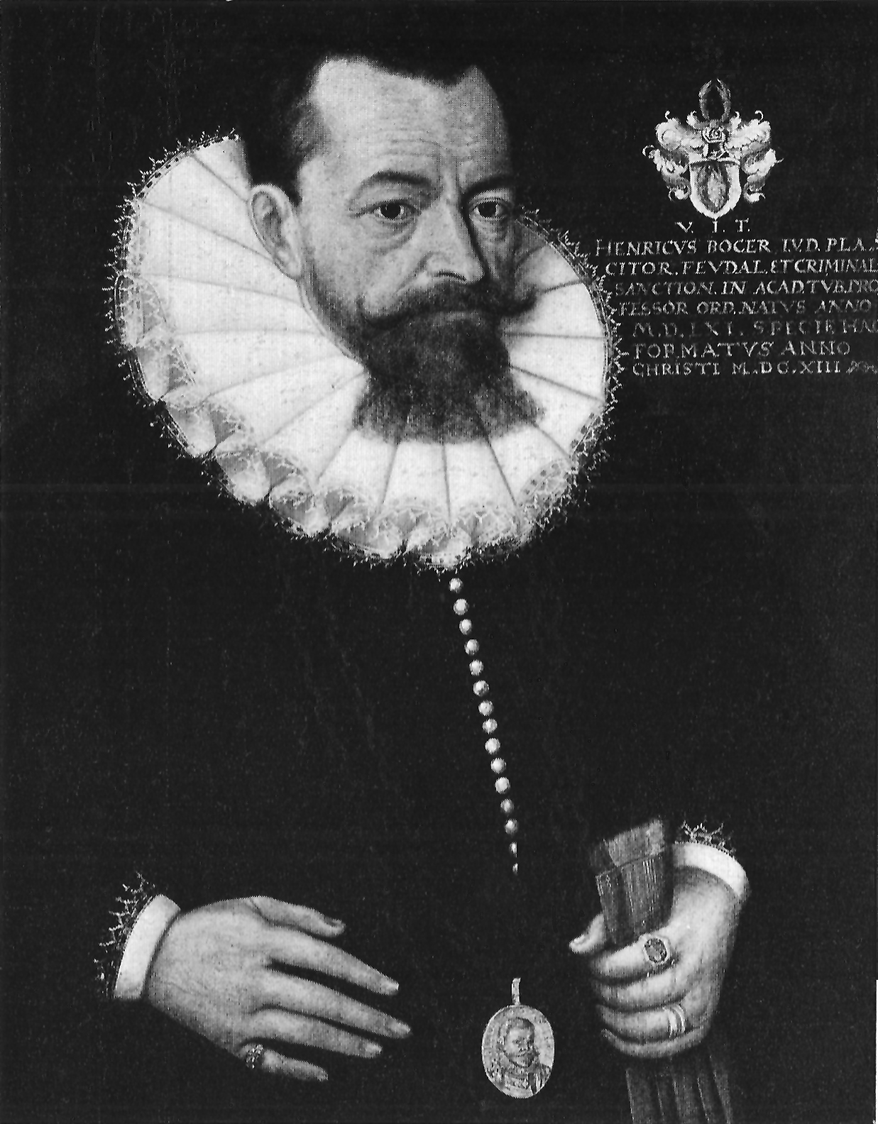 Prof. Heinrich Bocer (1561–1630), (Ölbildnis, Tübinger Professorengalerie)